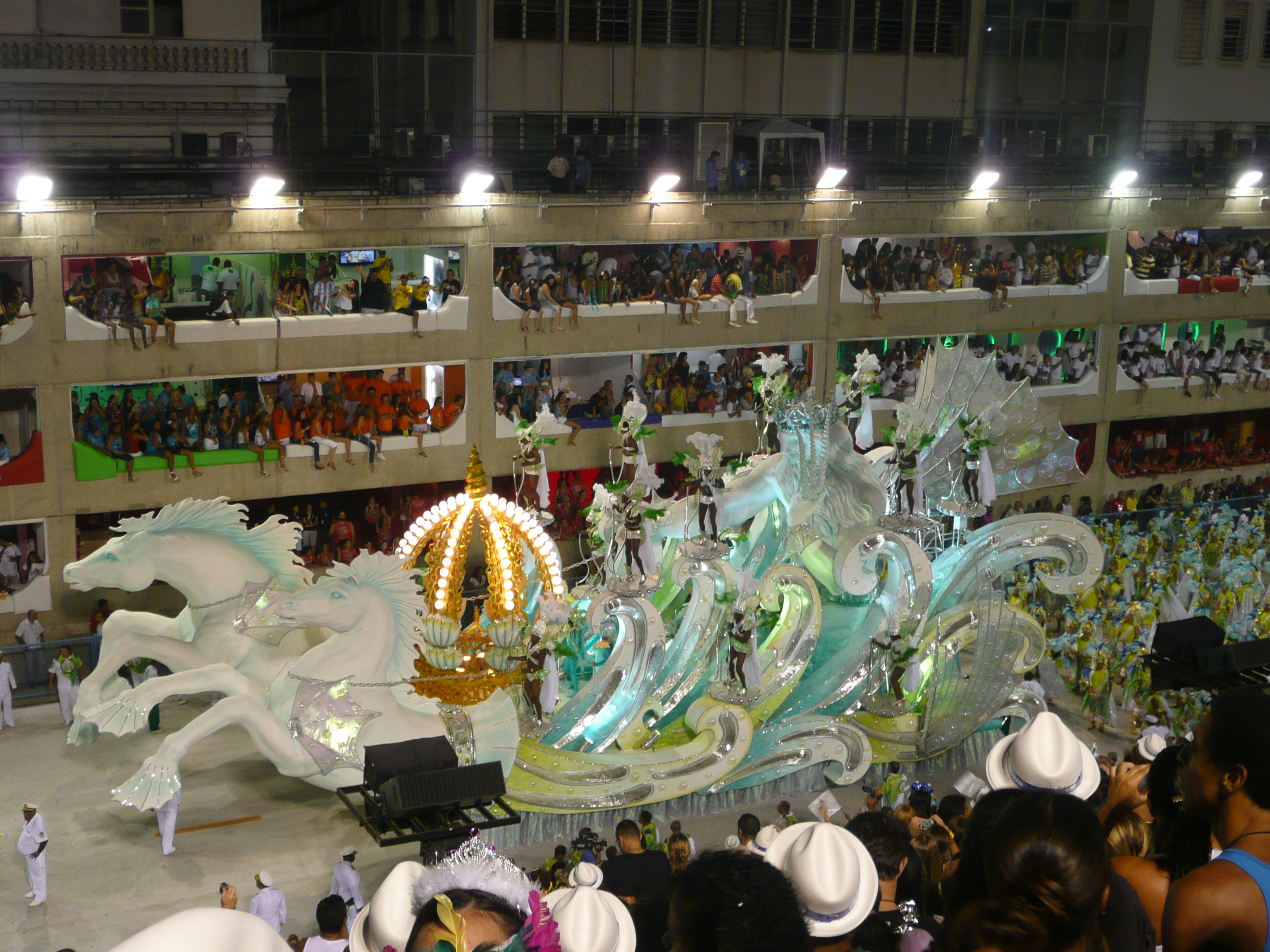 Império Serrano Samba School parade (2009).